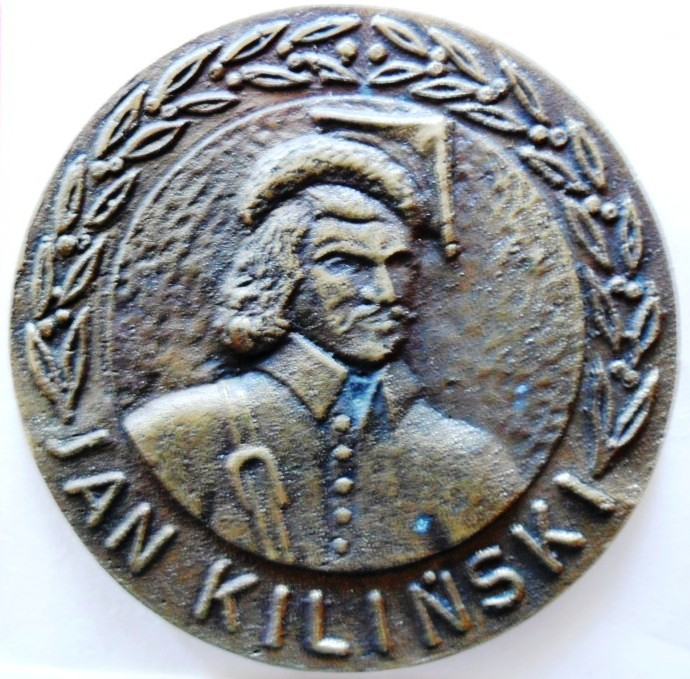 Medal pamiątkowy 4 PDPiech.